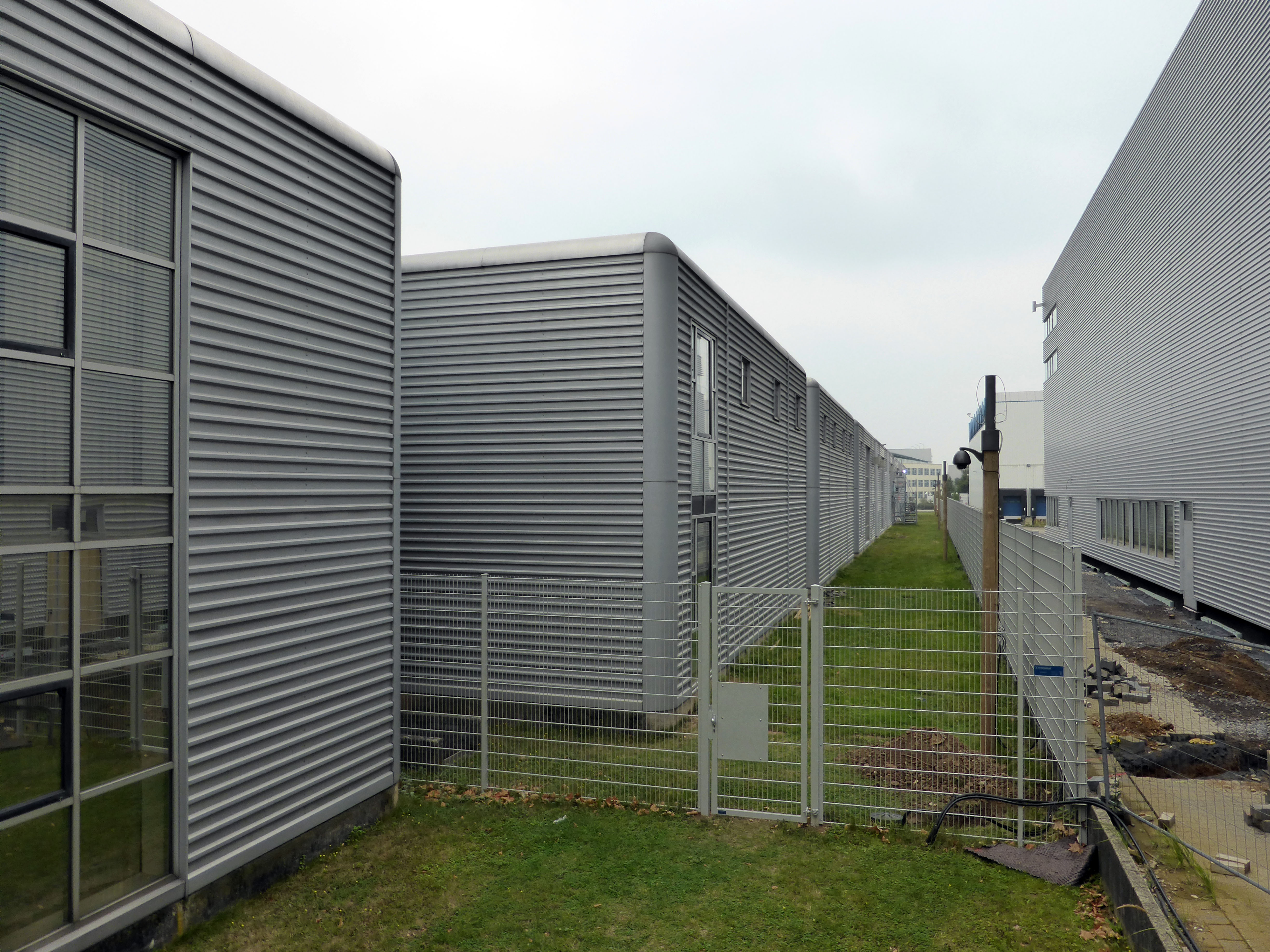 Rimowa, Lager-, und Produktionsgebäude, Mathias-Brüggen-Str. in Köln; Architektur: GATERMANN + SCHOSSIG